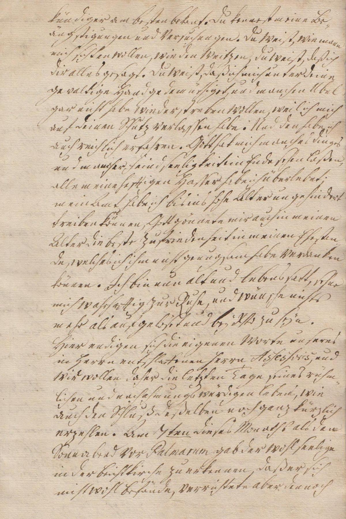 Seite 19 der Leichenpredigt für den Pastor August Wilhelm Reinhart (1696/1770), Bürger der Stadt Heringen an der Helme.